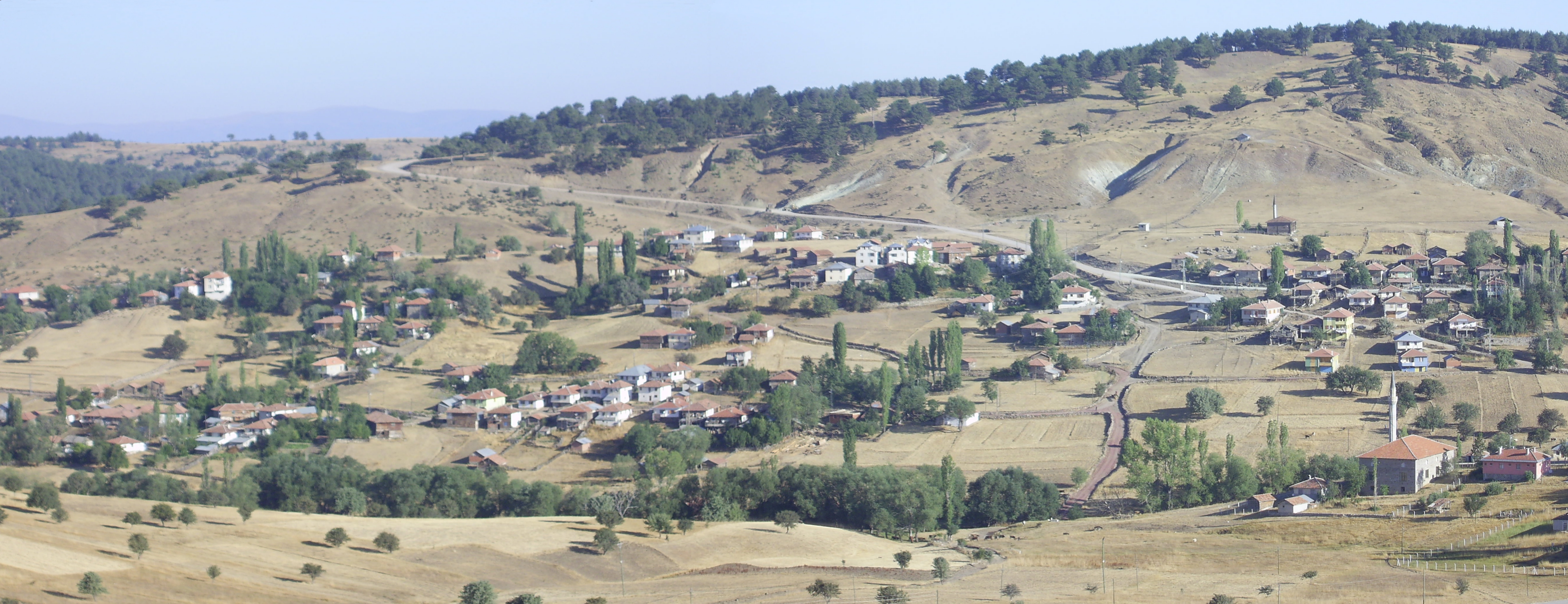 Kilkuyu, Tosya , Kastamonu